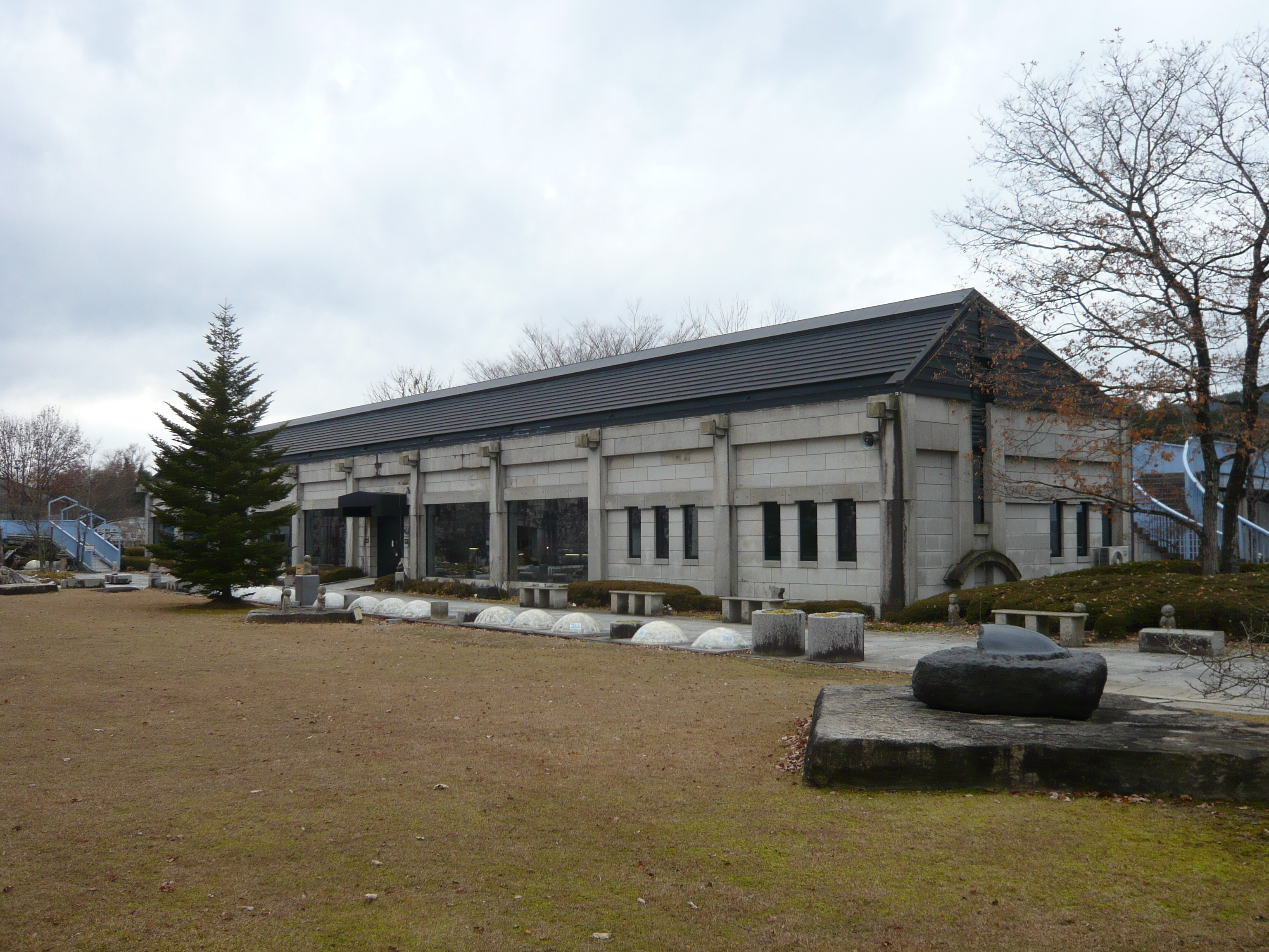 博石館内の鉱物博物館